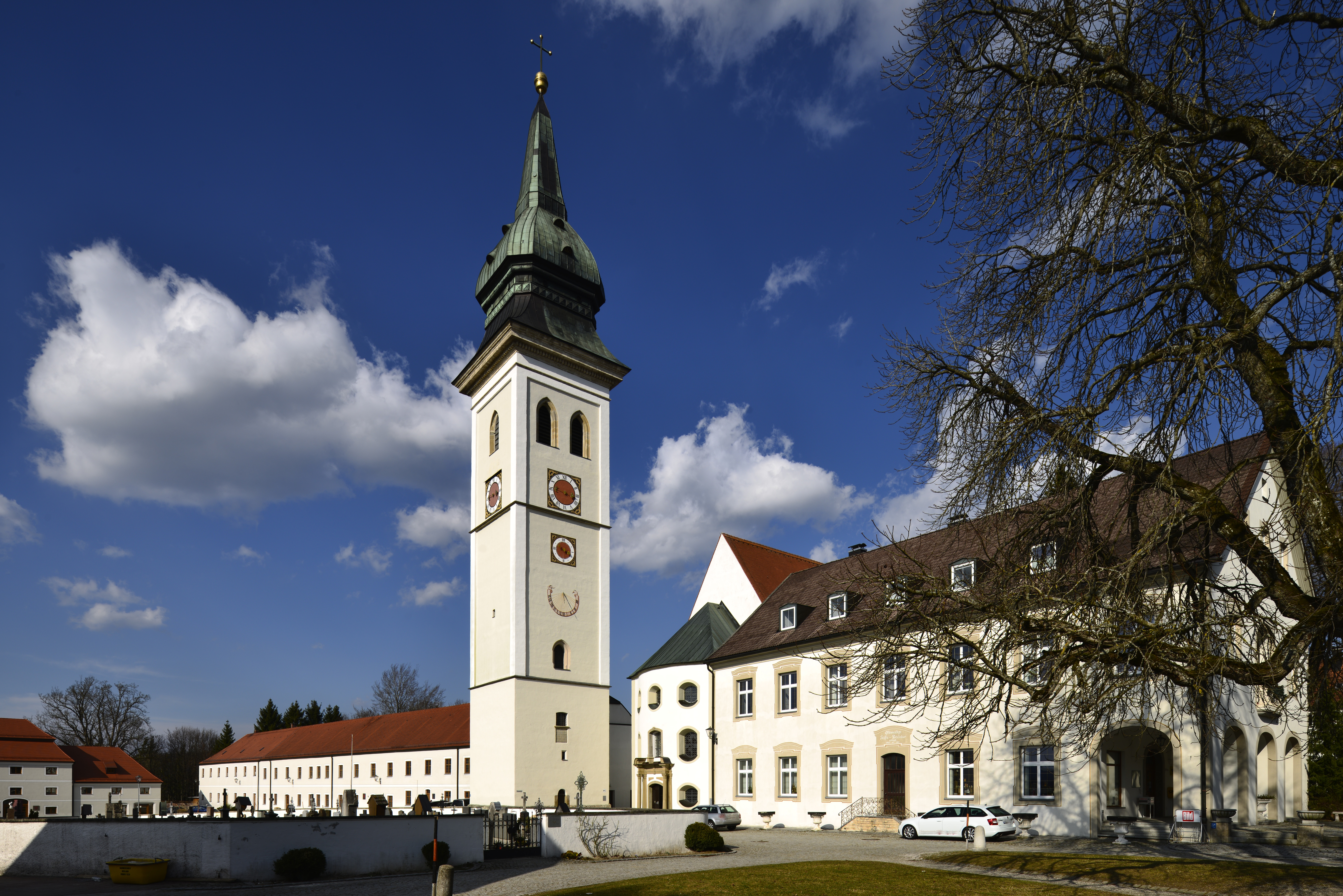 Rottenbuch.